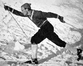 Nils Täpp